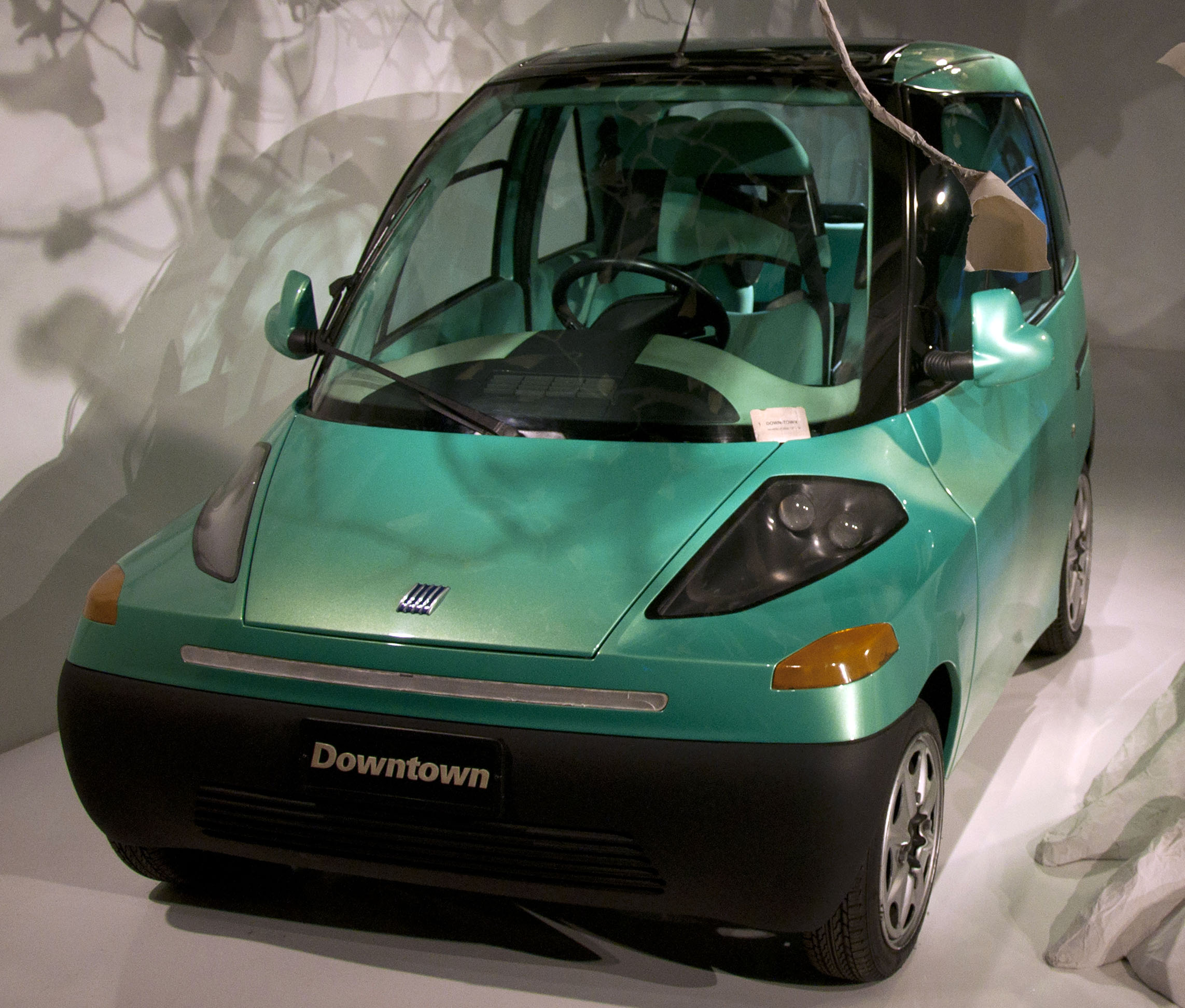 Museo Nazionale dell'Automobile di Torino (MAUTO). Fiat Downtown Concept, 1993.